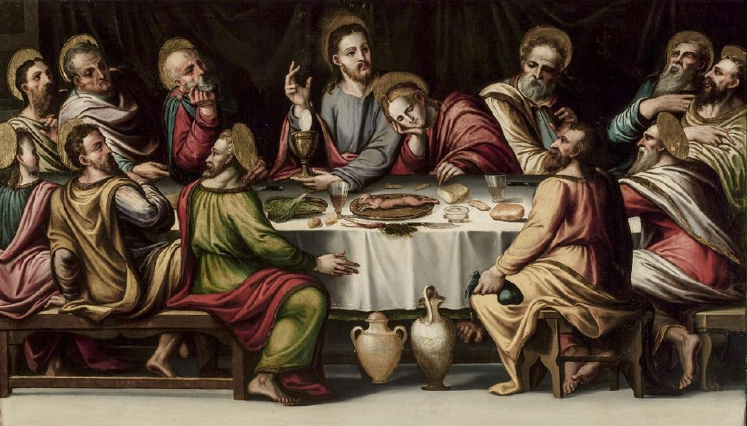 ´Última cena, óleo sobre lienzo, 87,5 x 41,5 cm, Sevilla, Museo de Bellas Artes. Procedente del convento Madre de Dios de Sevilla, el lienzo, catalogado como anónimo en el museo, ha sido atribuido por Juan Antonio Gómez Sánchez a Antonio de Alfián («Antonio de Alfián y Juan de Oviedo el Viejo. El retablo de la Inmaculada de la Parroquia de Santa Ana de Sevilla (1573-1574)», Atrio, nº 19, 2013, pp. 49-68).